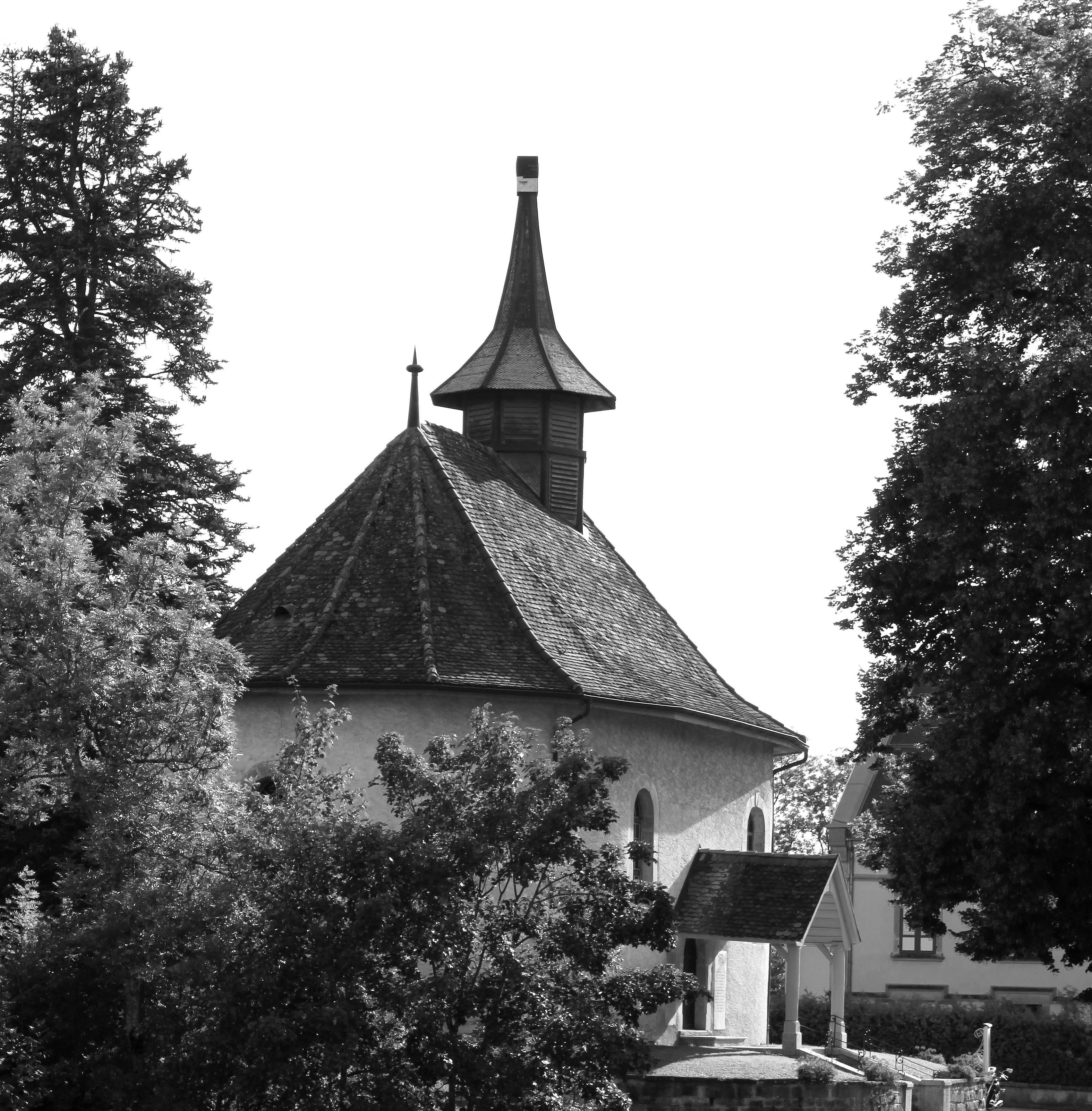 Suisse, canton de Vaud, Oron-la-Ville, Église réformée d'Oron.